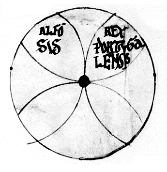 Un dos primeiros sinais rodados de Afonso Henriques, rei de Portugal.